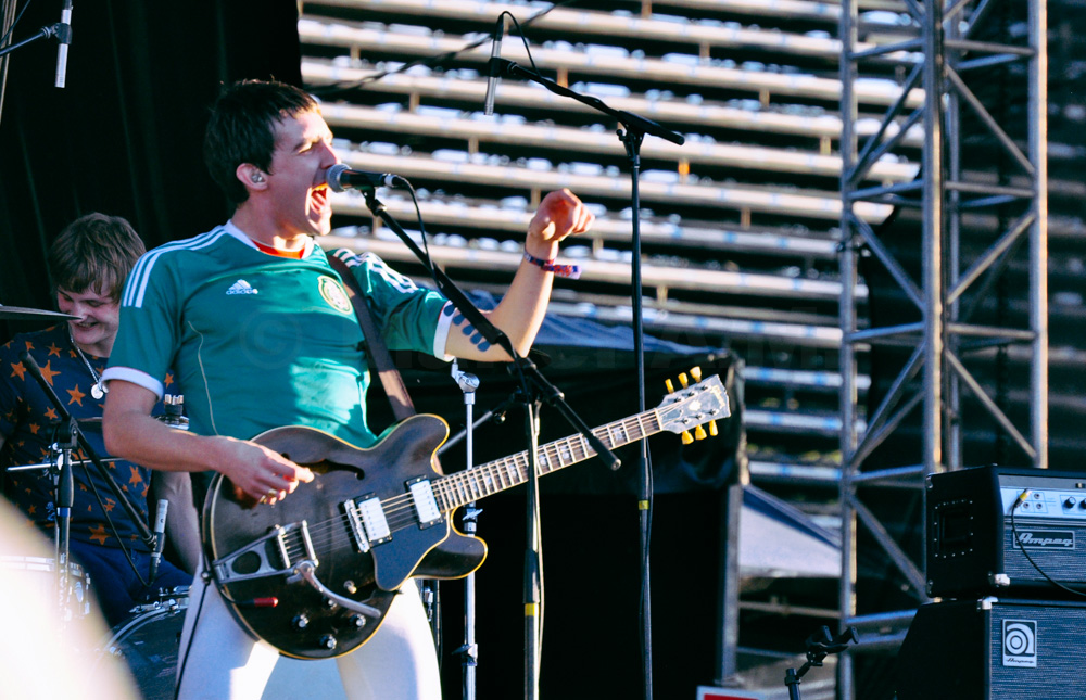 Archivo: Festival Corona Capital 2013 © Mariel A.M.